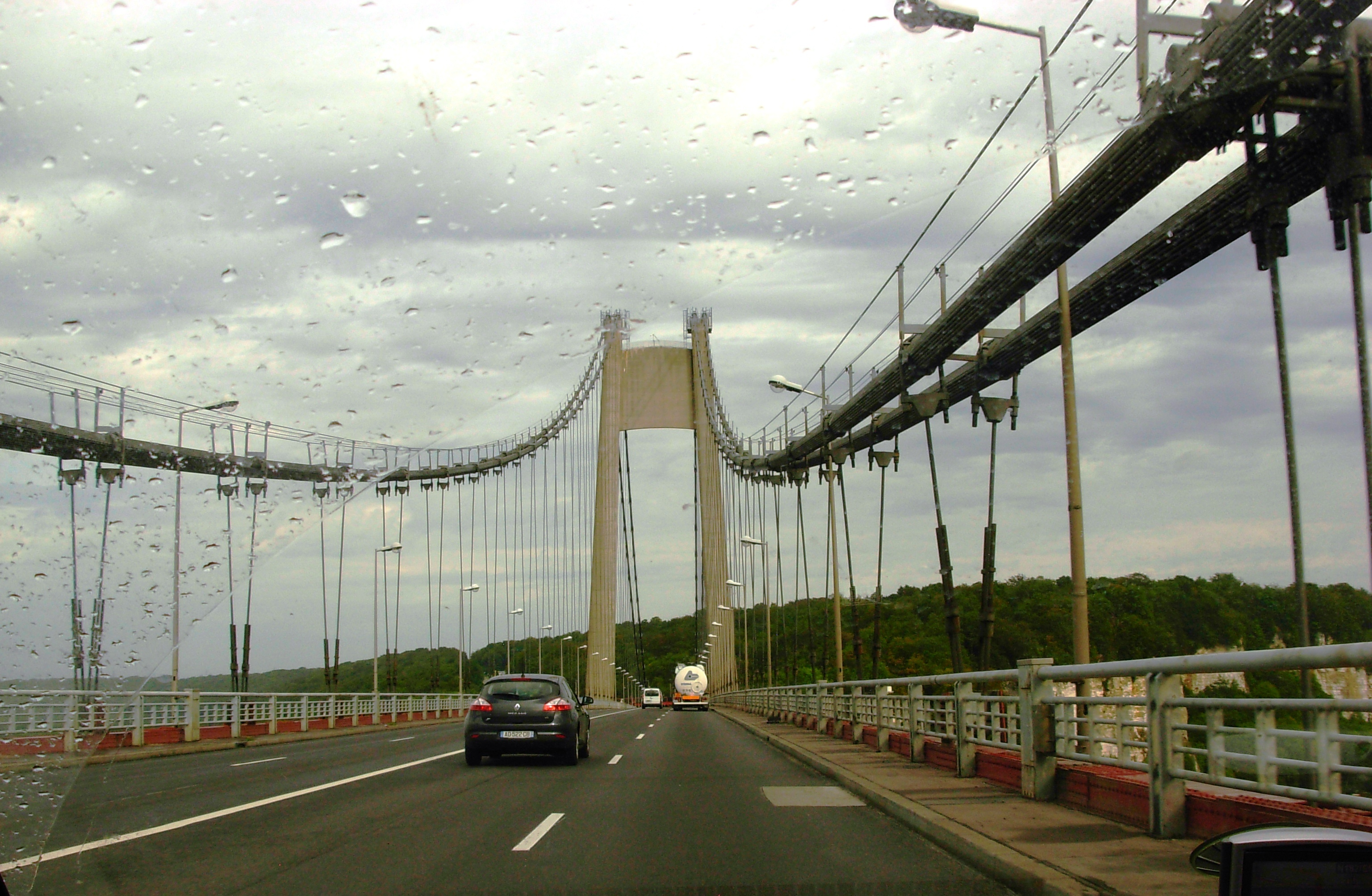 Bridge over river seine at Quillebeuf-sur-Seine